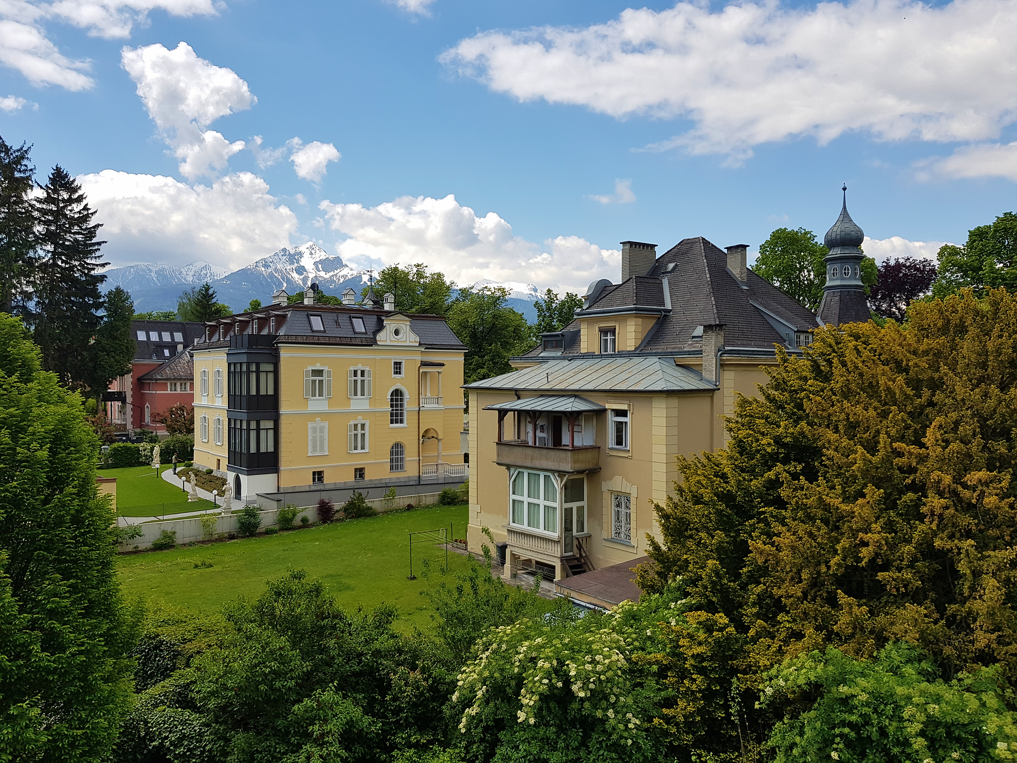 Innsbruck-Saggen: Villa Harmonia (links) und Haus Windsor (rechts), Gartenseite This media shows the remarkable cultural object in the Austrian state of Tyrol listed by the Tyrolean Art Cadastre with the ID 115918. (on tirisMaps, pdf, more images on Commons, Wikidata) This media shows the remarkable cultural object in the Austrian state of Tyrol listed by the Tyrolean Art Cadastre with the ID 126107. (on tirisMaps, pdf, more images on Commons, Wikidata)